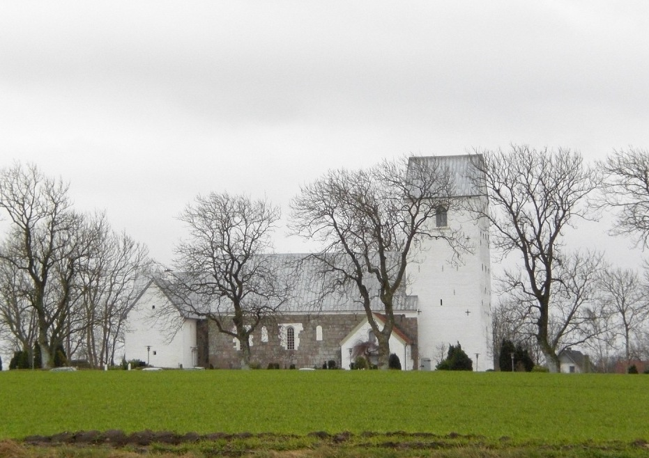 Church. Gunderup Church. Region Nordjylland. Denmark.